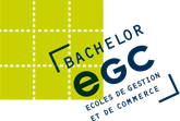 Logo du réseau Bachelor EGC